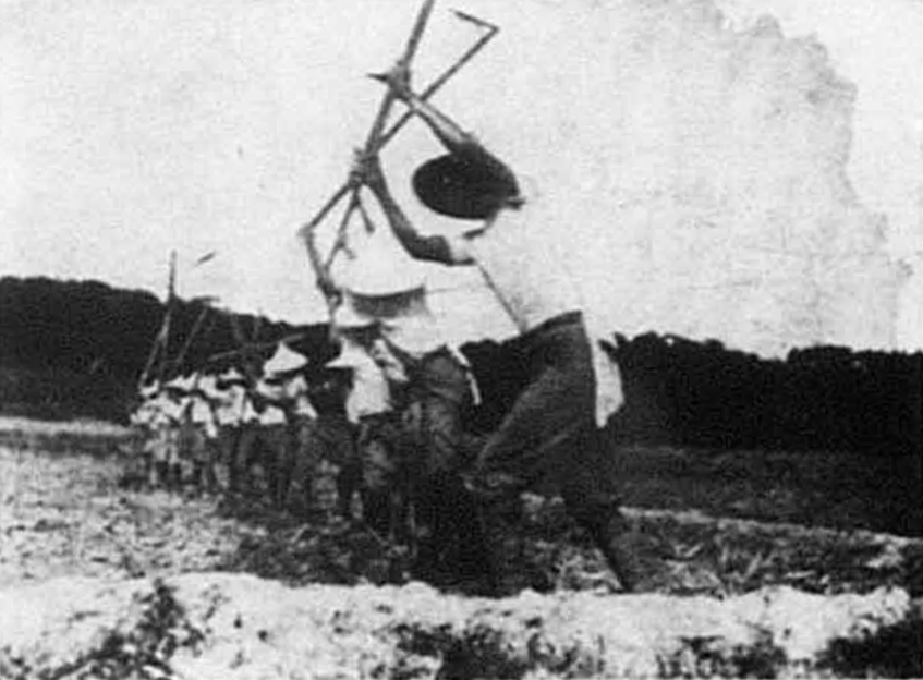 中文（台灣）: 曾文郡農民道場成立於1936年，位於曾文郡官田庄烏山頭